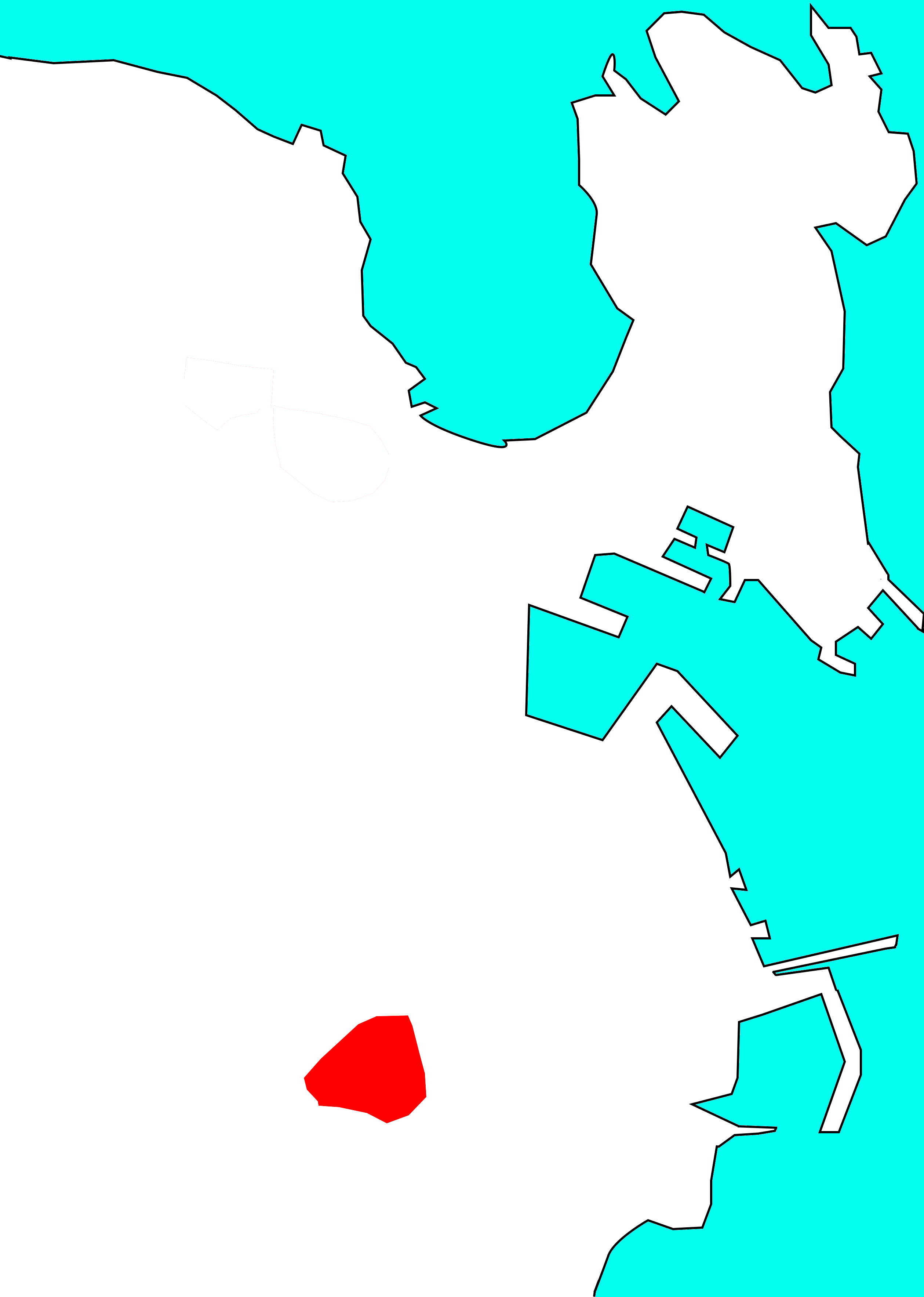 Situación do Barrio das Flores no concello da Coruña, segundo